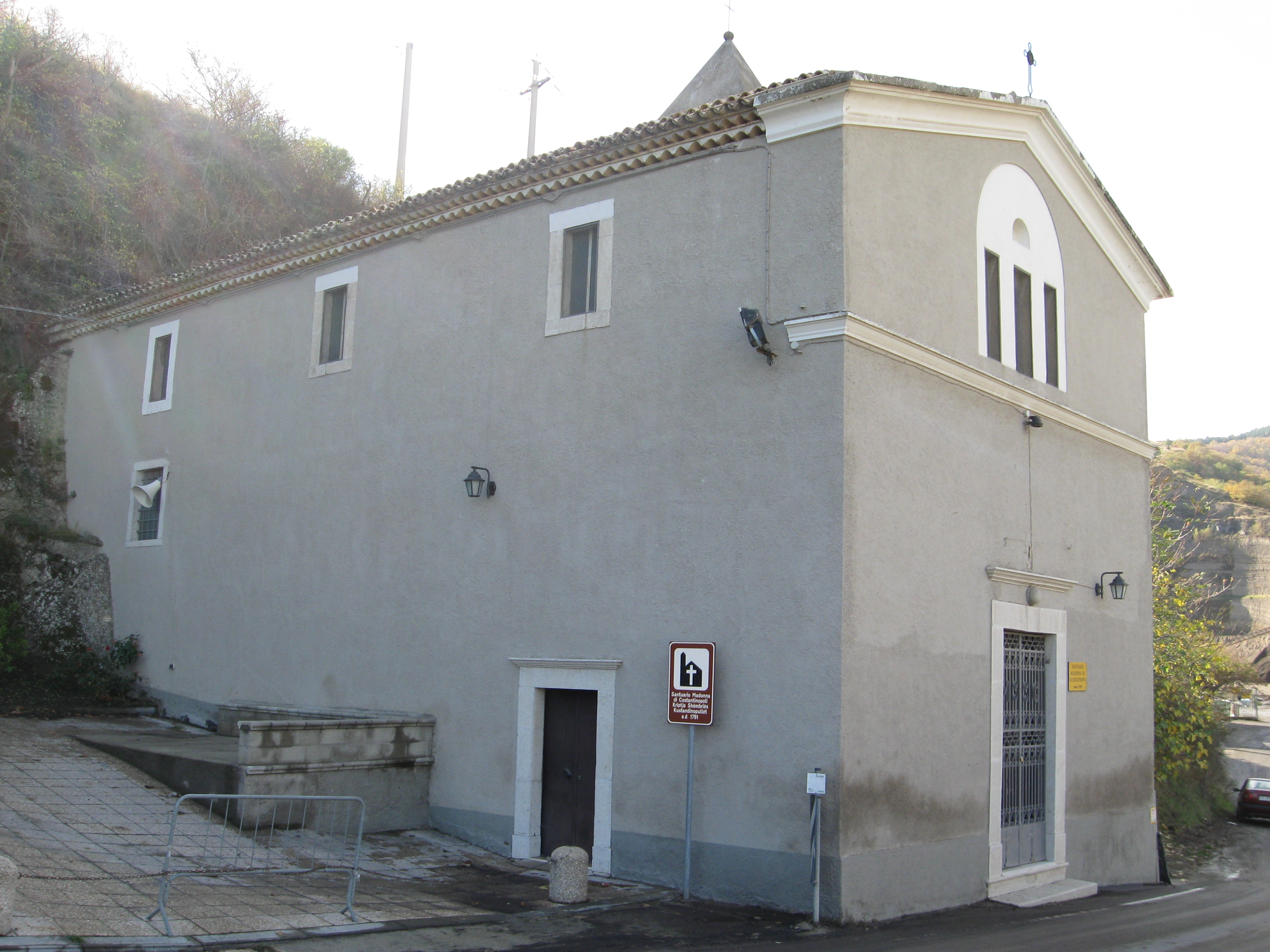 Chiesa della Madonna di Costantinopoli, Barile, Basilicata